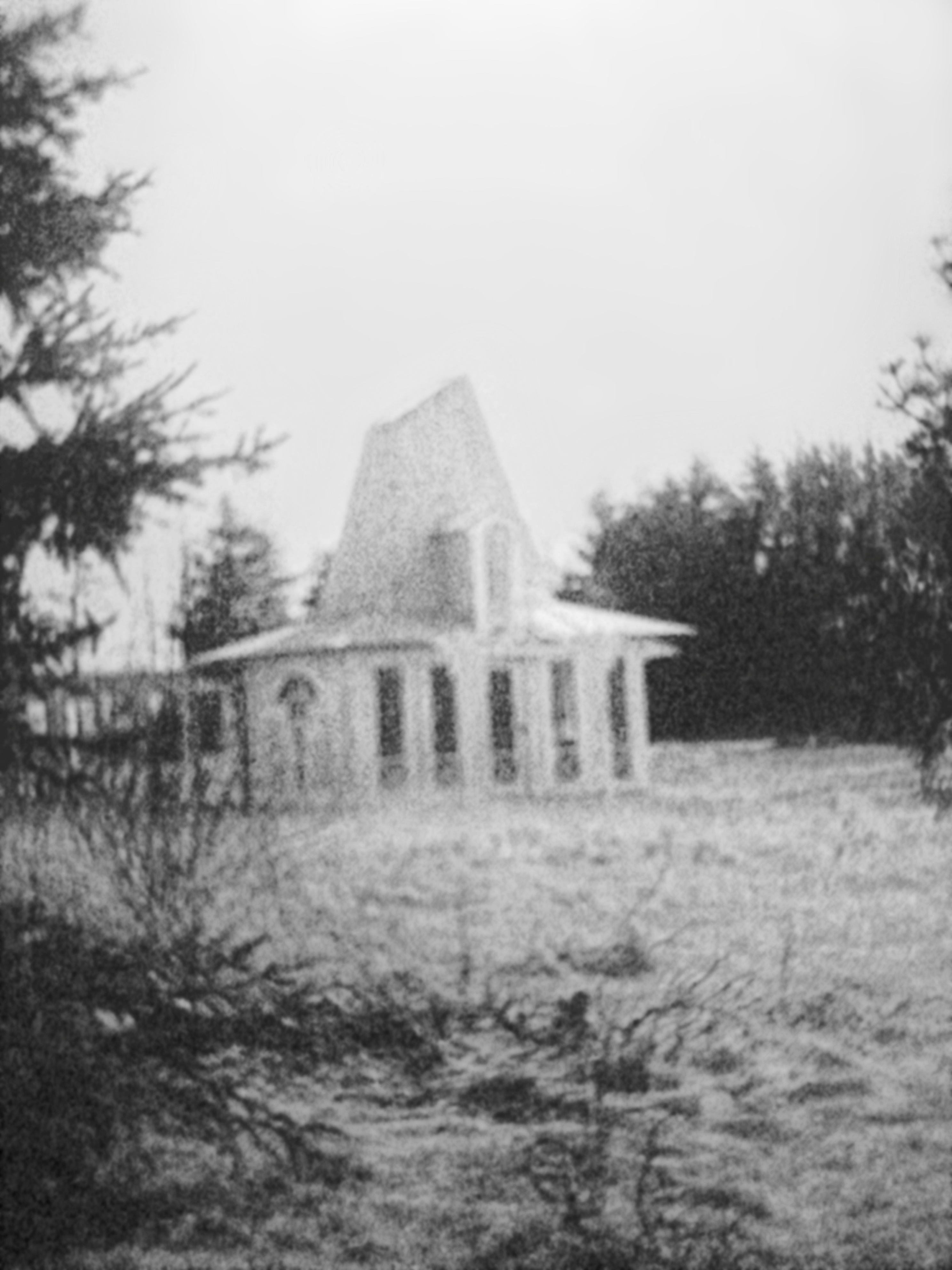 Pavillon Bent Exner in Pandrup (Nordjütland)